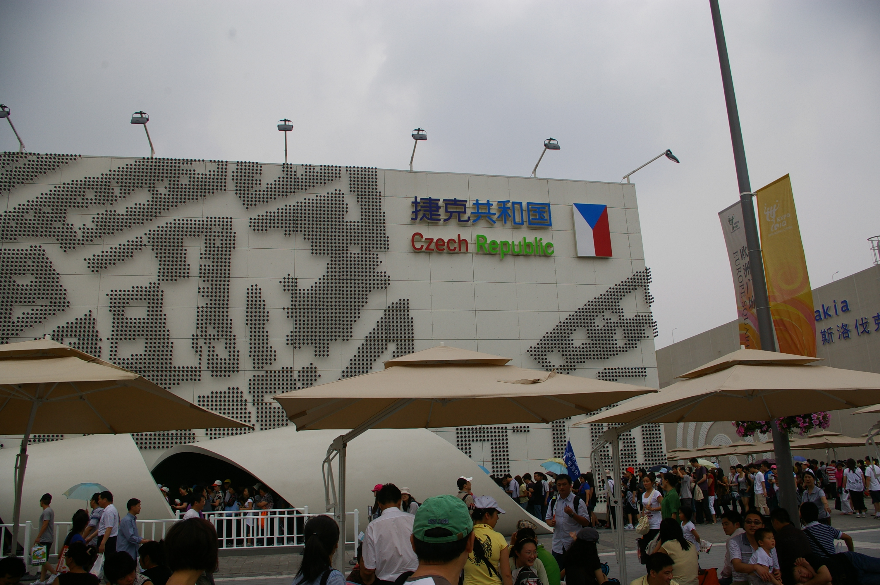 上海世博会捷克馆